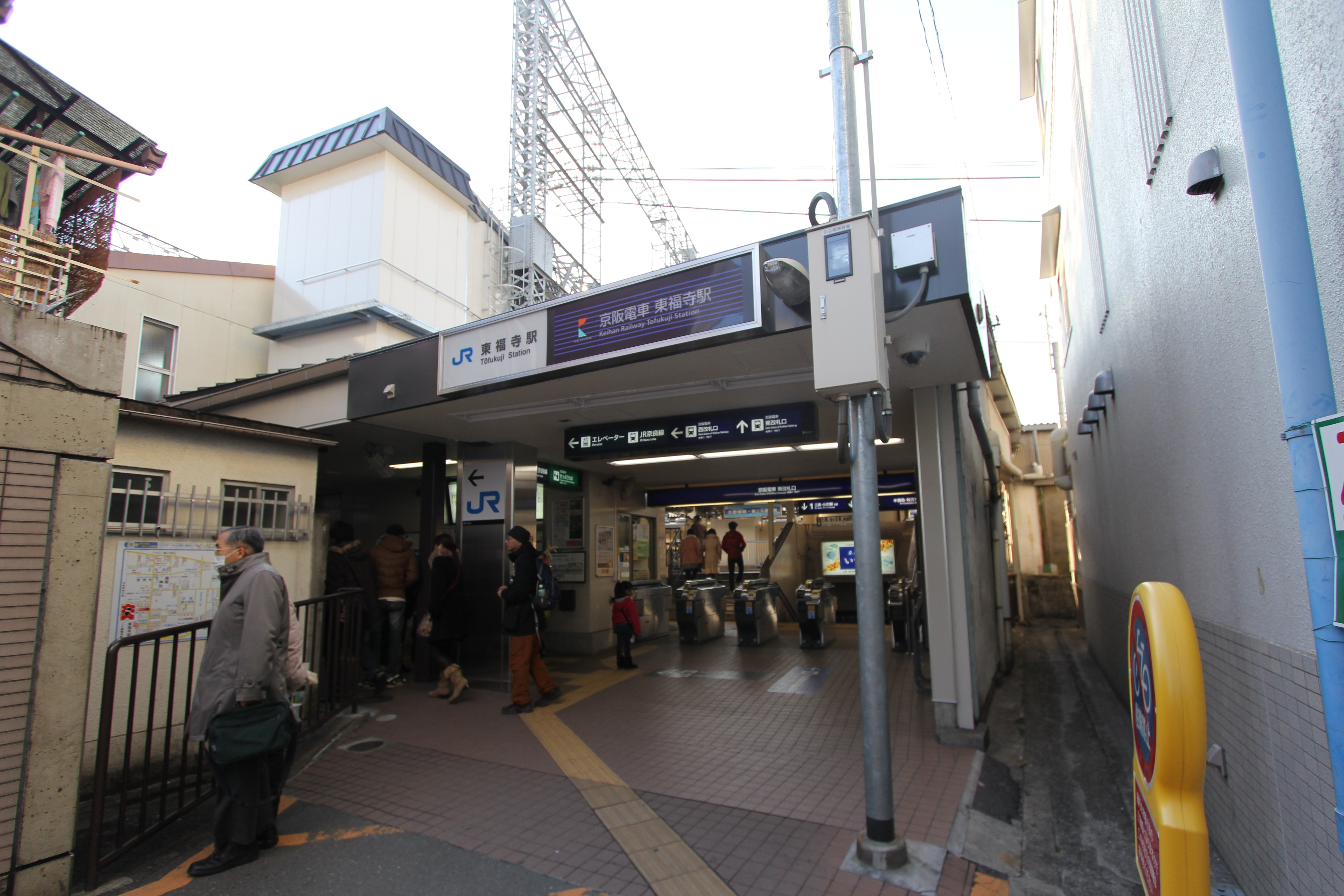 東福寺駅